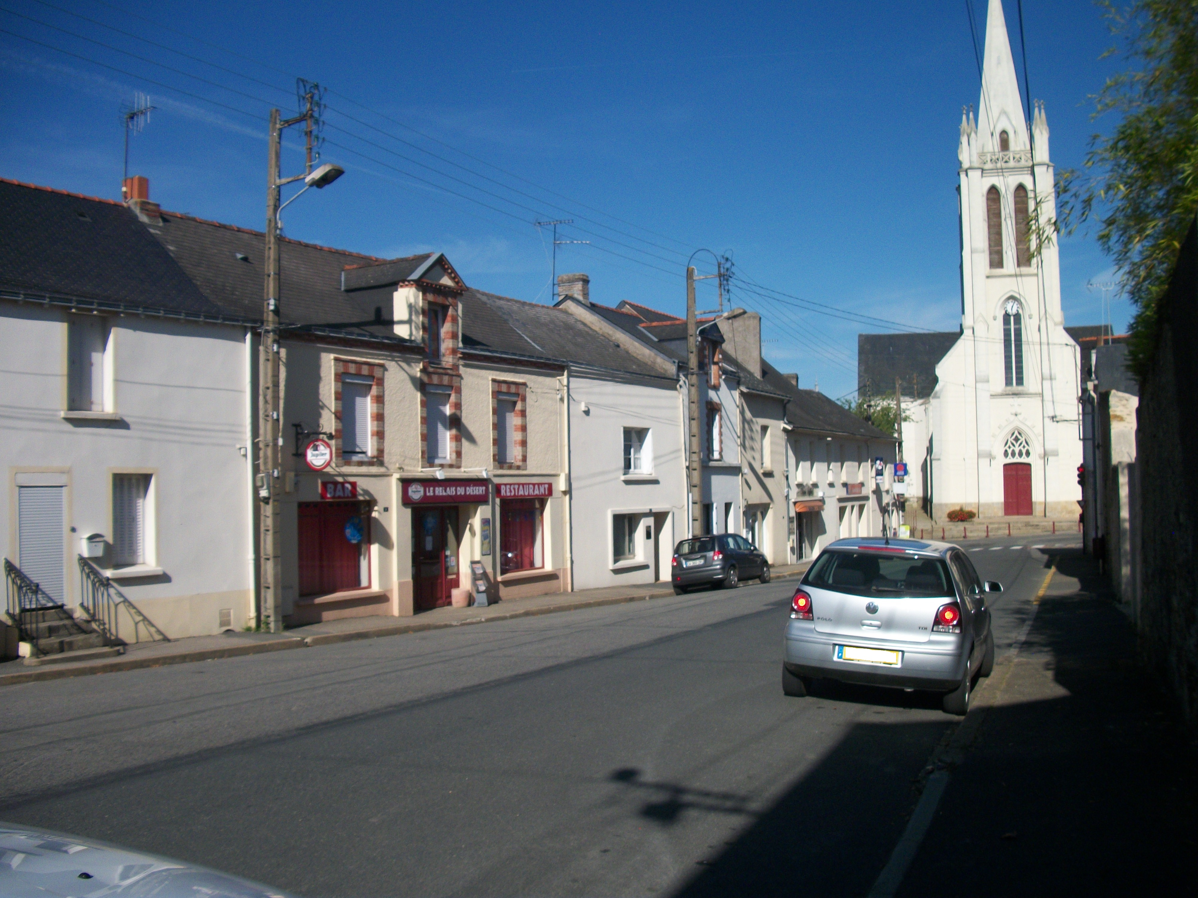 Saint-Mars